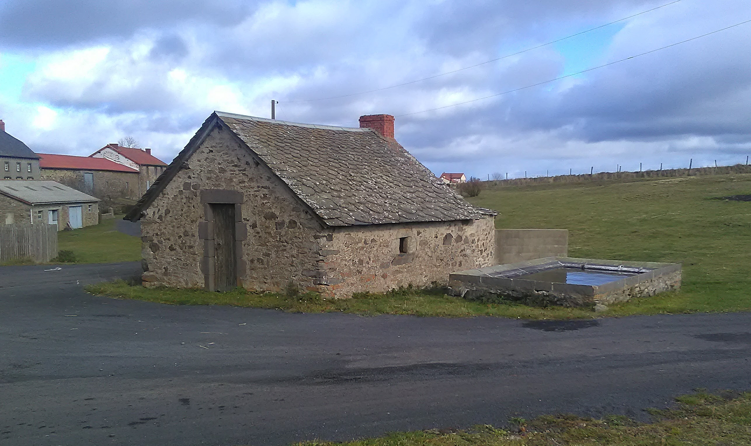 Four et lavoir du hameau de La Fageolle, à Vieillespesse, dans le Cantal.